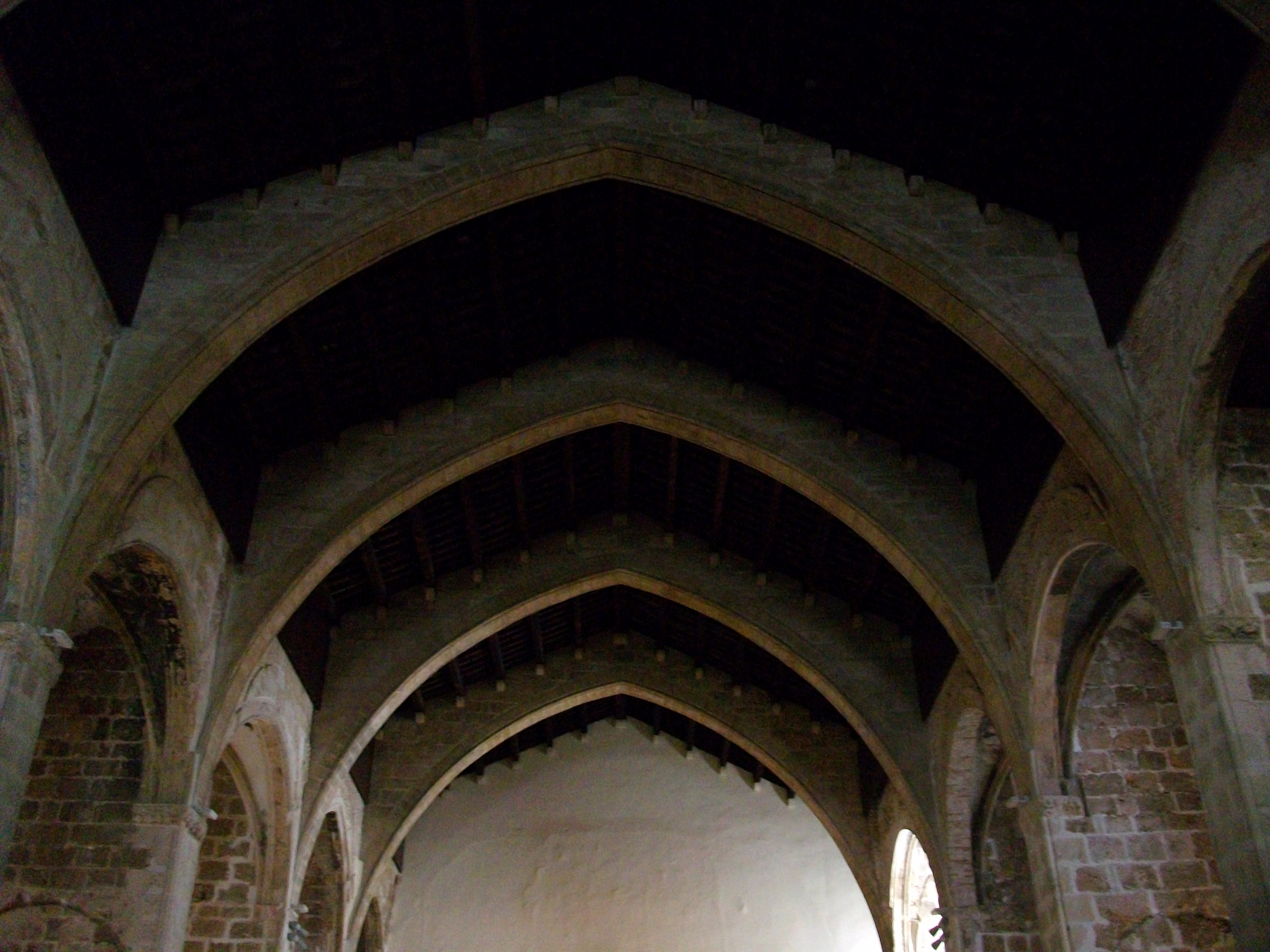 Església de Sant Francesc de Xàtiva, arcs diafragma.